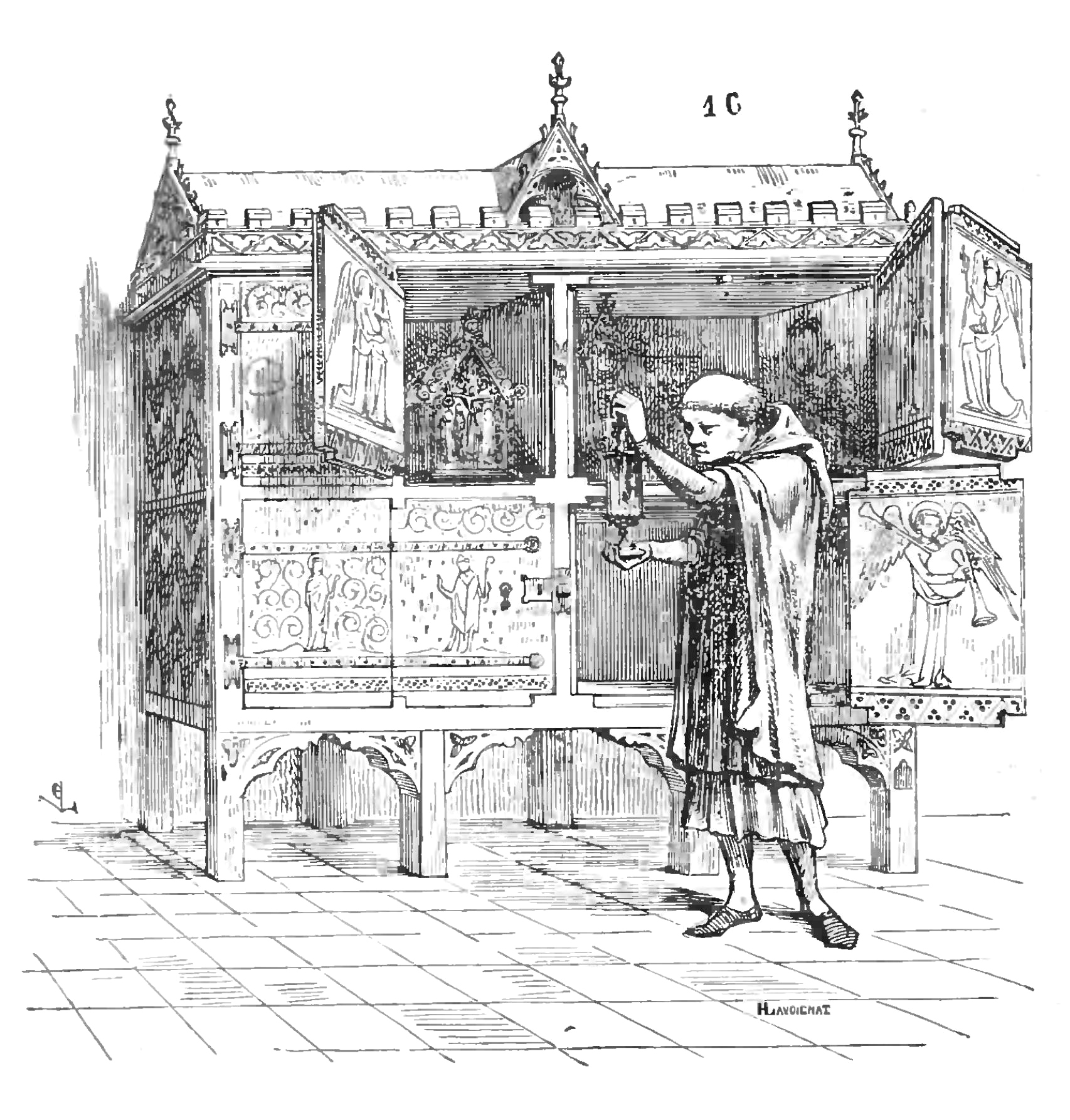 Illustration de l'article « ARMOIRE » du Dictionnaire raisonné du mobilier français.